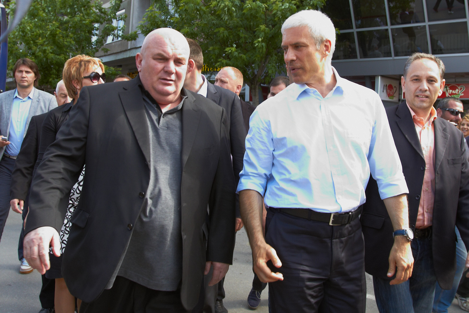 Kandidat za predsednika Srbije i predsednik Demokratske stranke Boris Tadić posetio je Jagodinu gde je u centru grada razgovarao sa građanima. (8. maj 2012); Foto servis DS